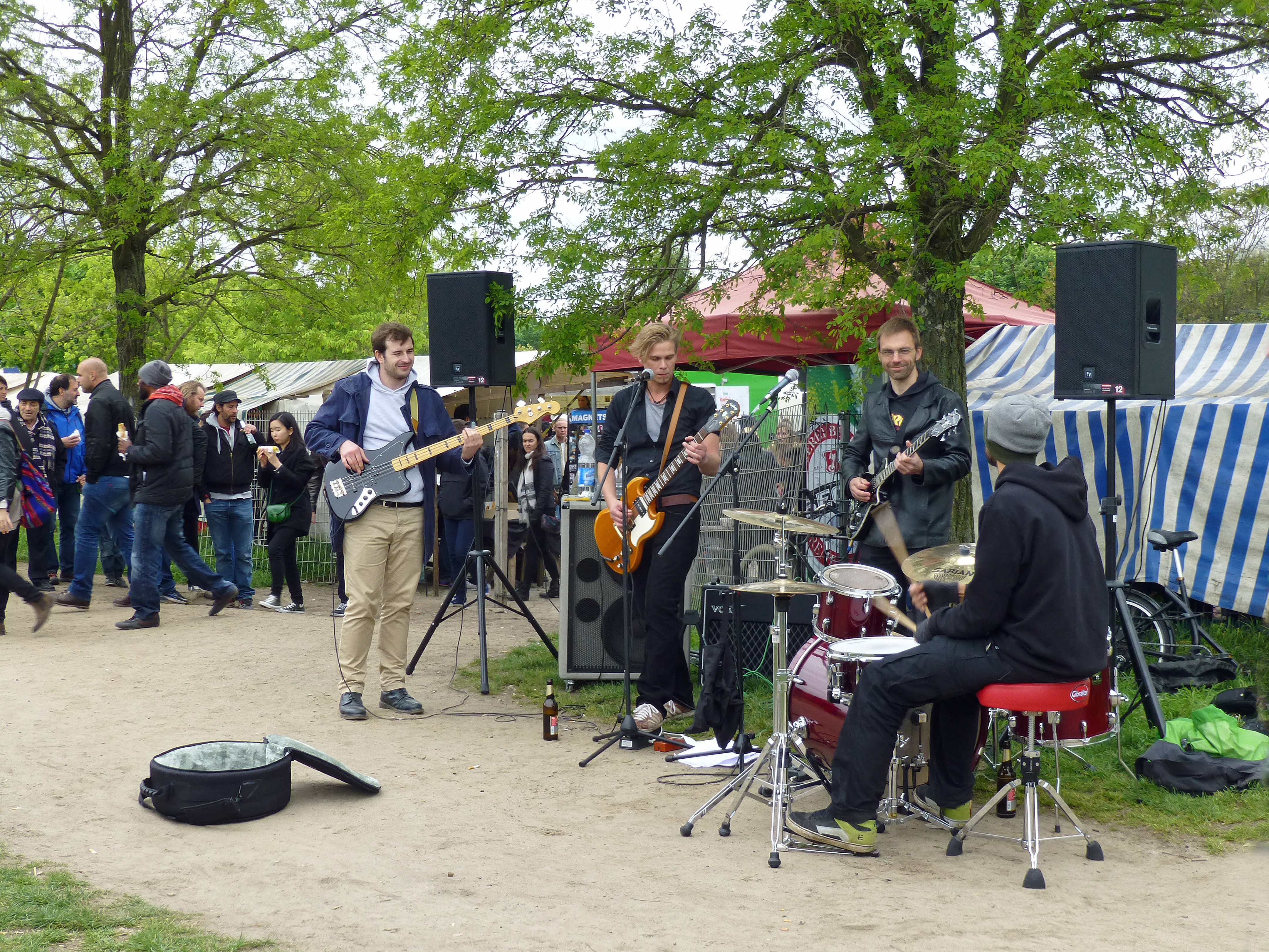 Berlin : musiciens au Mauerpark